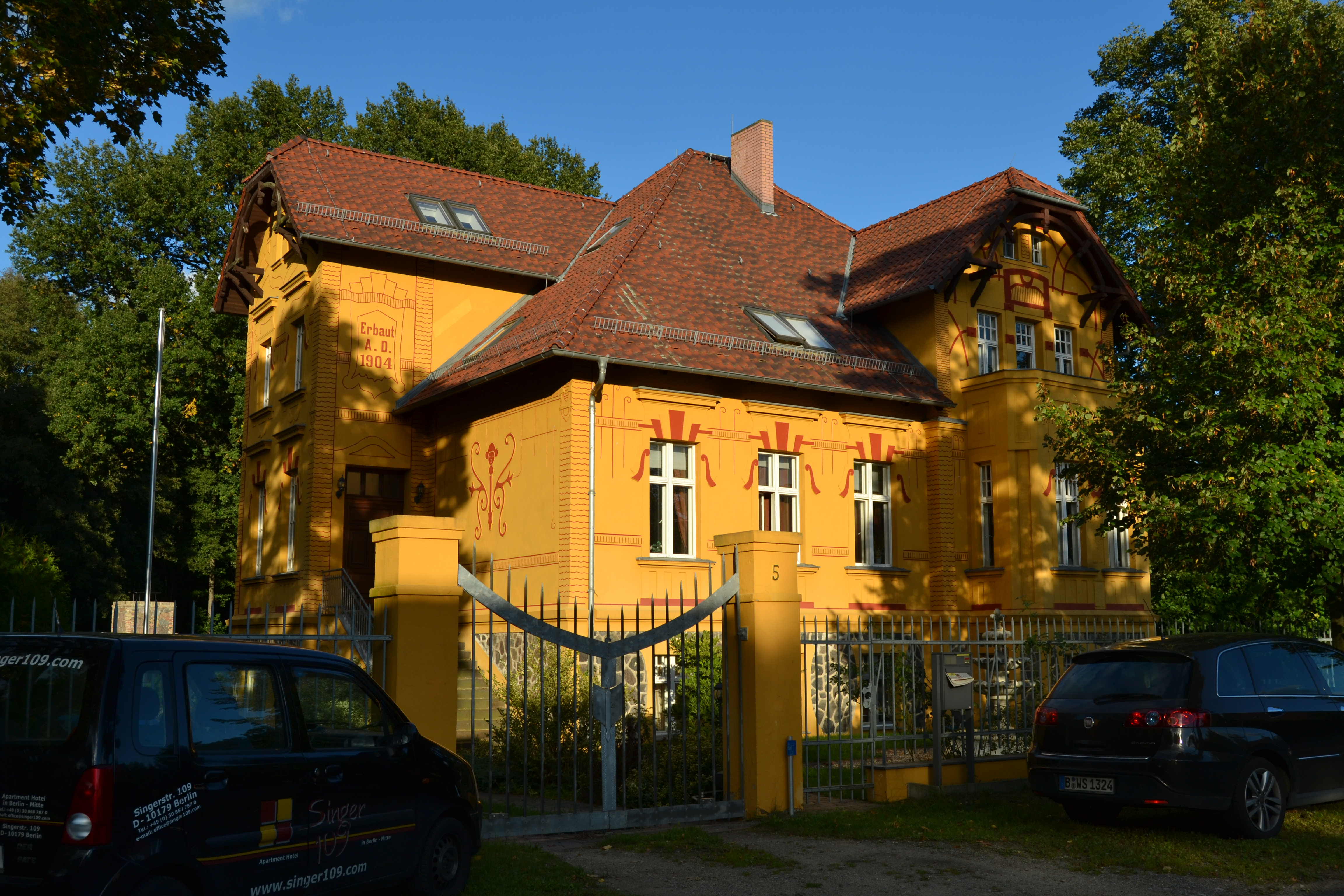 Villa mit Hofgebäude und Grundstückseinfriedung in Waldring 5 in Bruchmühle/Altlandsberg